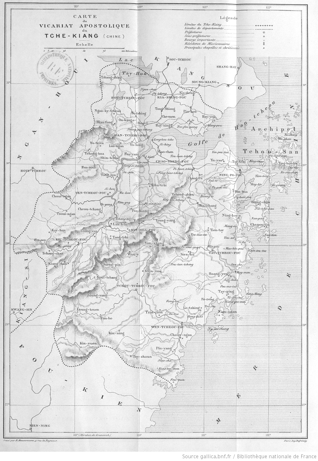 Carte du Tché Kiang (aujourd'hui province du Zhejiang) en Chine. Paul-Marie Reynaud, C.M., Une autre Chine, Abbeville, 1897, éd. C. Paillart.